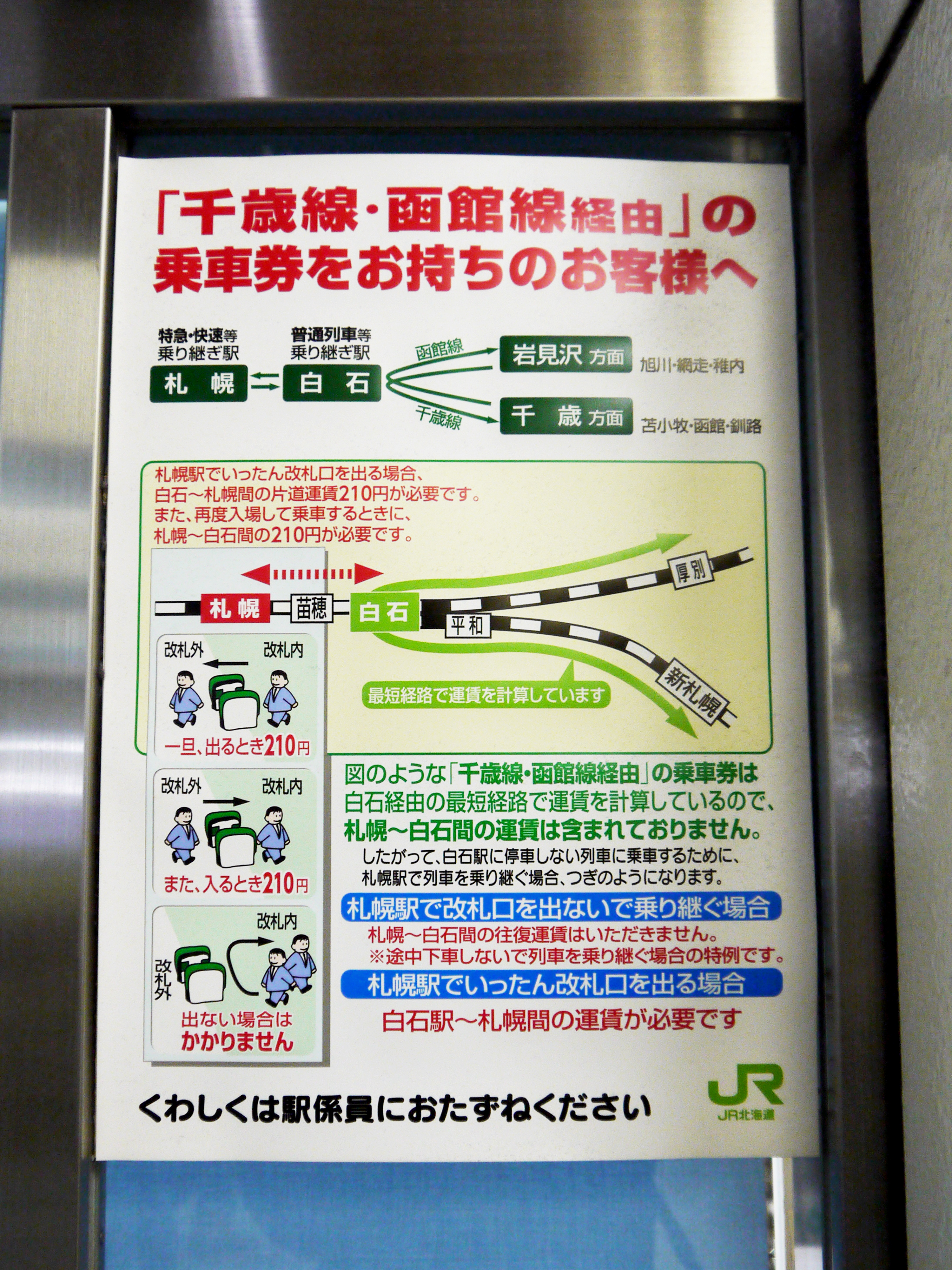 千歳線から函館本線に乗り継ぐ場合で、札幌駅で下車する時は、白石駅・札幌駅間の往復運賃が必要なことが掲示されている。